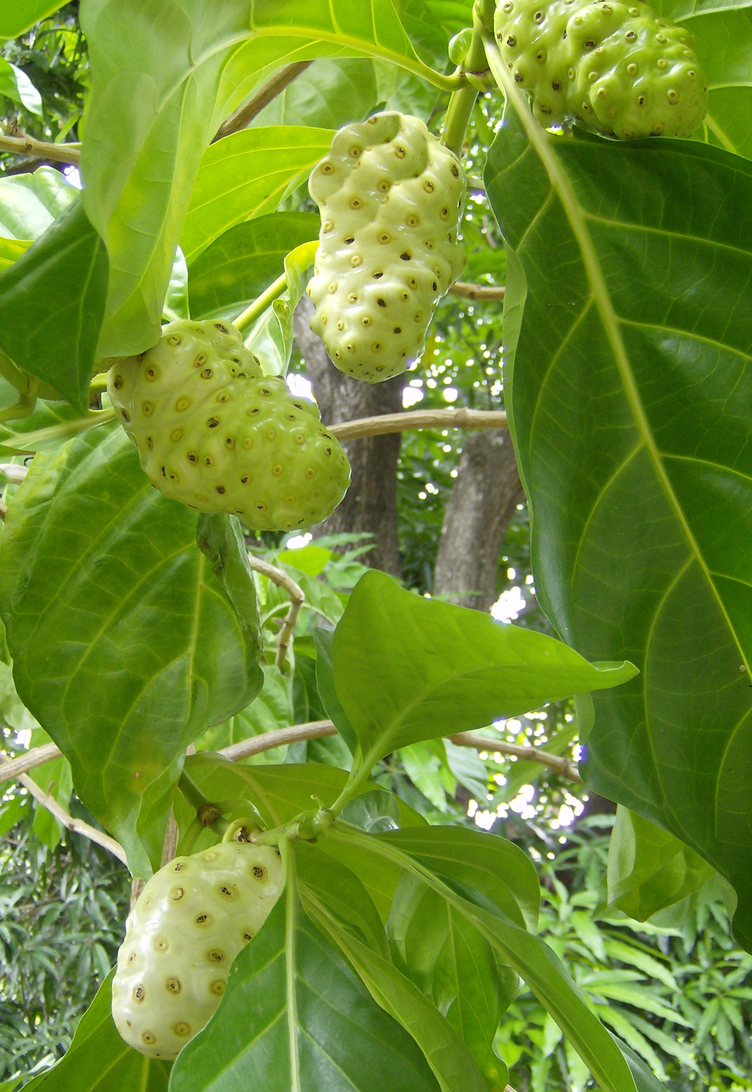 Morinda citrifolia. El none, fruta del diablo o mora de la India (Morinda citrifolia) es una planta arbórea o arbustiva de la familia de las rubiáceas; originaria del sudeste asiático, ha sido introducida a la India y la Polinesia. Se emplea extensamente como medicinal.